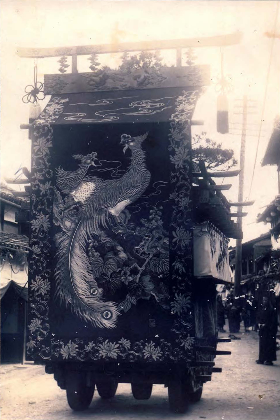 大正時代まで巡行していた30基の山車屋台の一つ。昭和2年3月の北丹後地震で失われた。